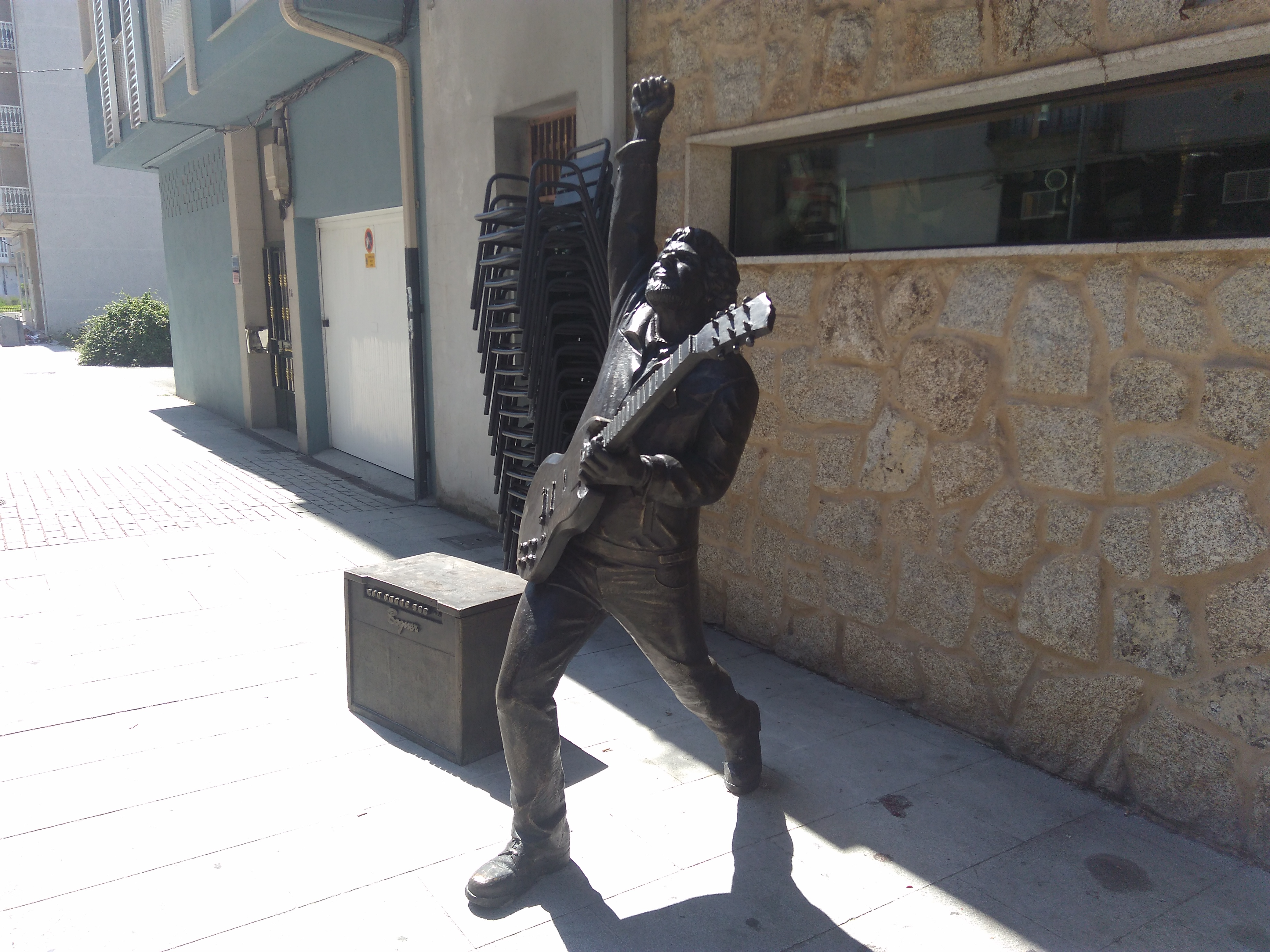 Estatua de Narf na Pousada das Ánimas en Boiro (A Coruña)